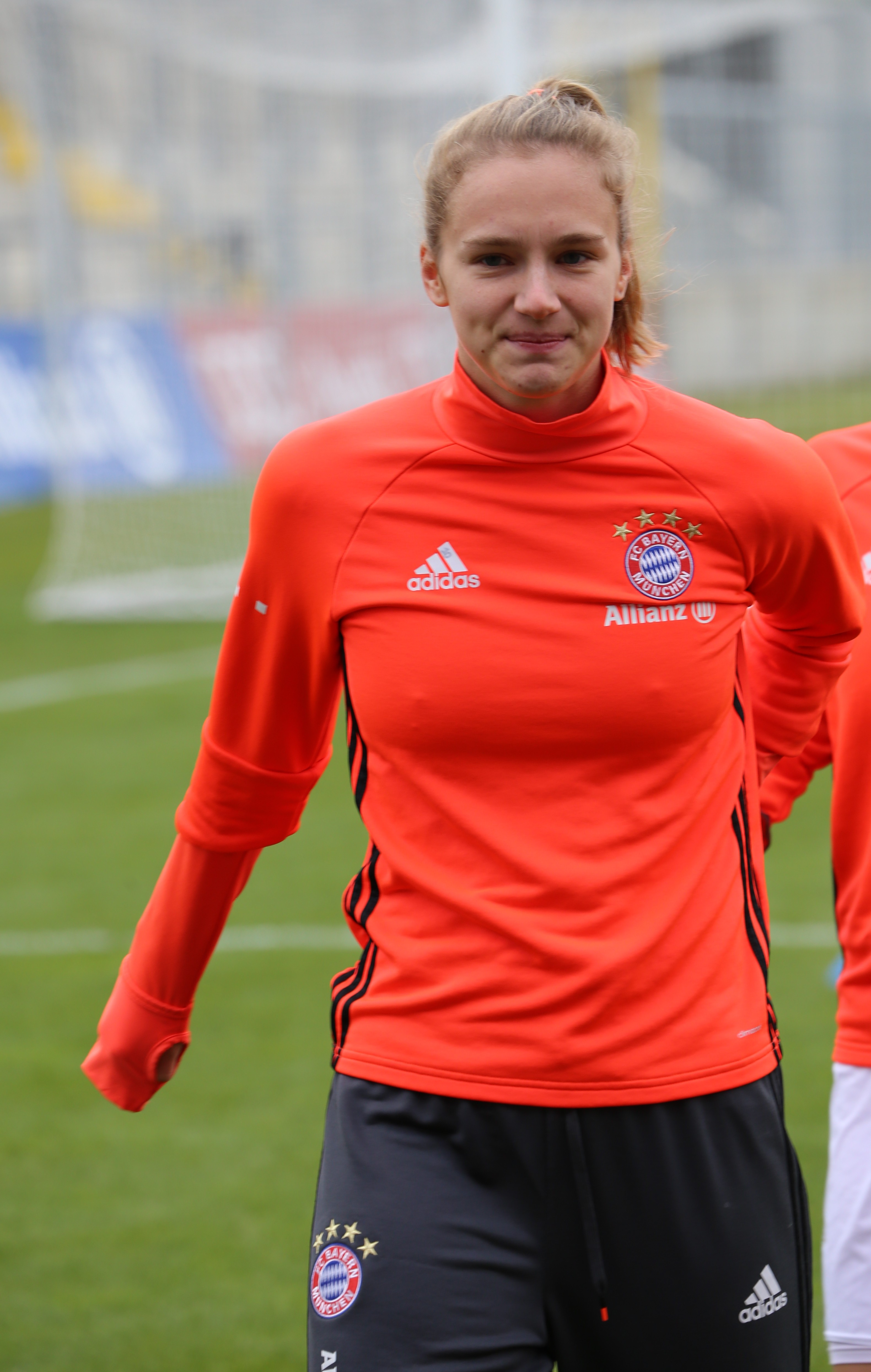 Vivianne Miedema (FC Bayern München) beim Aufwärmen vor demFrauen-Bundesliga-Spiel FC Bayern München gegen 1. FFC Frankfurt am 13. November 2016 im Stadion an der Grünwalder Straße, München (Ergebnis war 1:0).